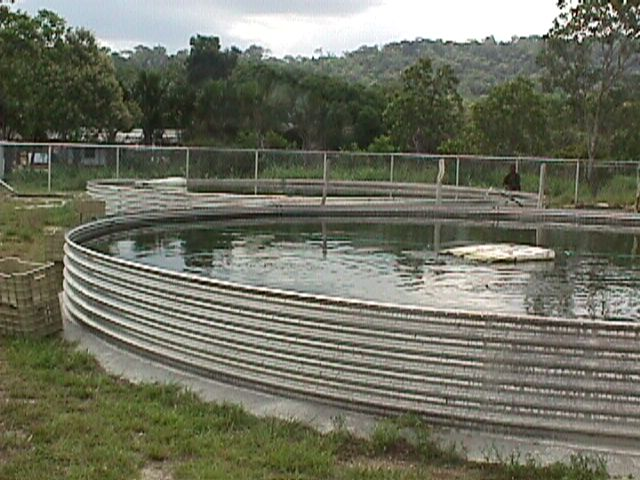 Zoocriadero de Tortuga Arrau del Orinoco.